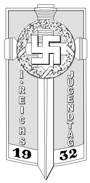 Das Potsdam-Abzeichen der NSDAP war ein 1932 eingeführtes Tagungsabzeichen der Nationalsozialistischen Deutschen Arbeiterpartei, welches anlässlich des Ersten Reichsjugendtages in Potsdam vom 1. bis 2. Oktober 1932 in zwei Stufen, Bronze und Silber, ausgegeben wurde. Legal disclaimer This image shows (or resembles) a symbol that was used by the National Socialist (NSDAP/Nazi) government of Germany or an organization closely associated to it, or another party which has been banned by the Federal Constitutional Court of Germany. The use of insignia of organizations that have been banned in Germany (like the Nazi swastika or the arrow cross) are also illegal in Austria, Hungary, Poland, Czech Republic, France, Brazil, Israel, Ukraine, Russia and other countries, depending on context. In Germany, the applicable law is paragraph 86a of the criminal code (StGB), in Poland – Art. 256 of the criminal code (Dz.U. 1997 nr 88 poz. 553).